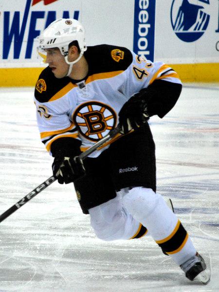 Bruins vs. Devils 2/13/09 Prudential Center, Newark, NJ